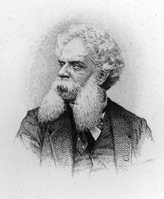 Italian composer Federico Ricci (1809-1877), Aqua-fortis by Saro Cucinotta, circa 1869.